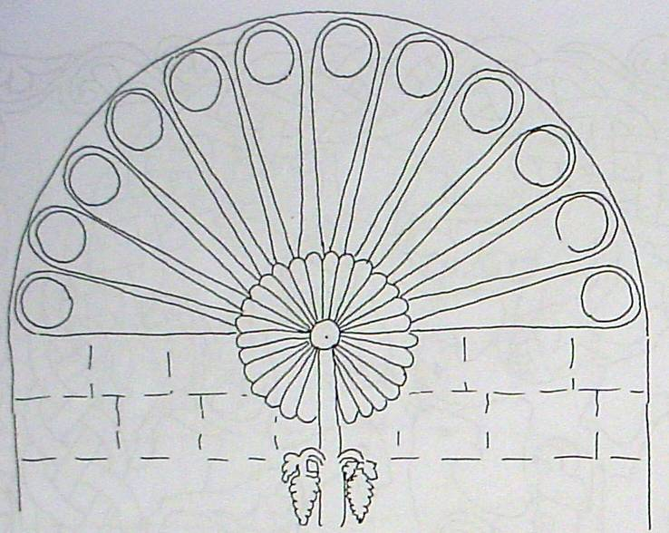 Mcheta grúziai templomán napsugárkévés díszítés